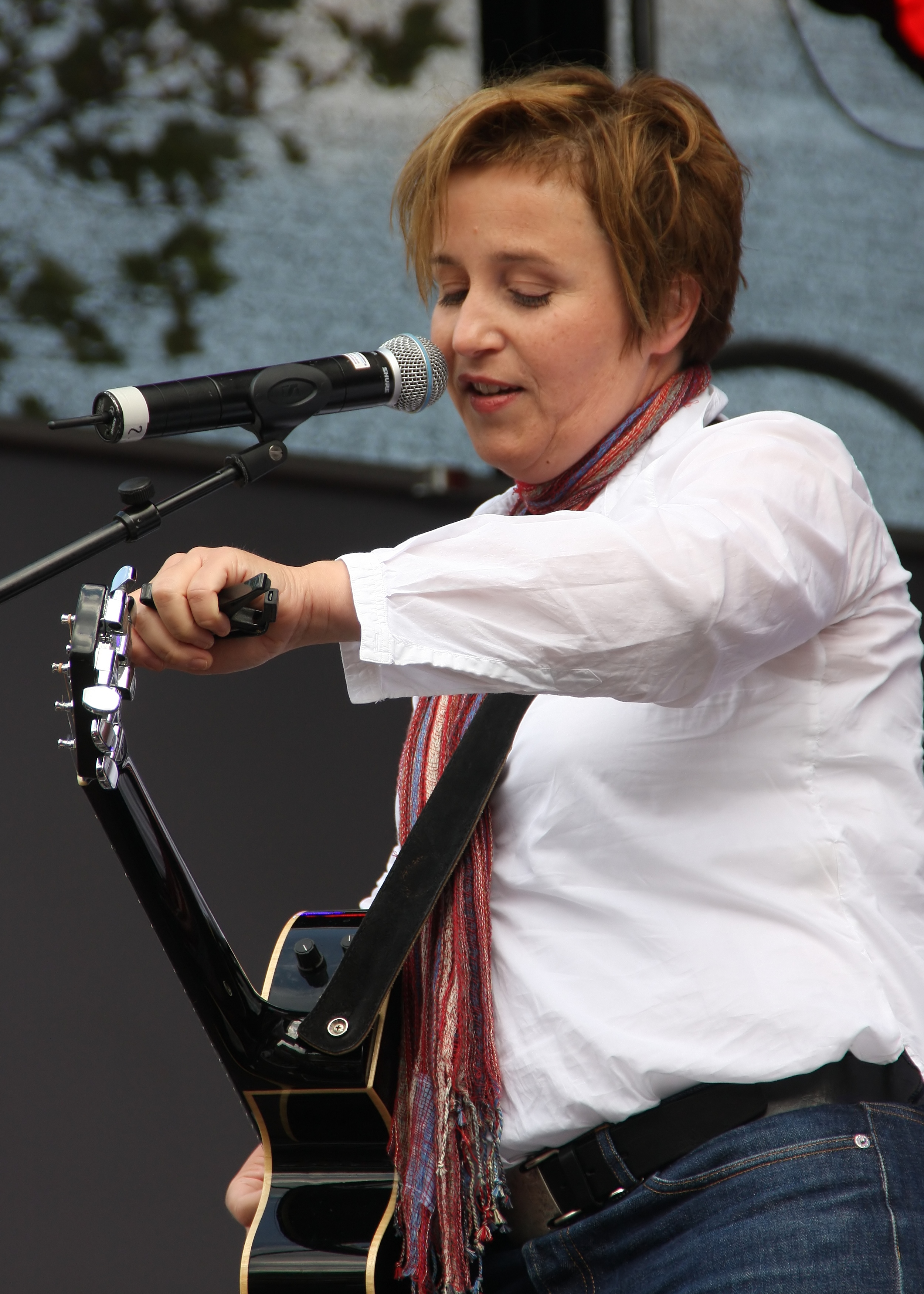 Katharina Franck auf der Hauptbühne auf dem Heumarkt, Köln. Bühnenprogramm zum CSD-Straßenfest/ColognePride 2009.